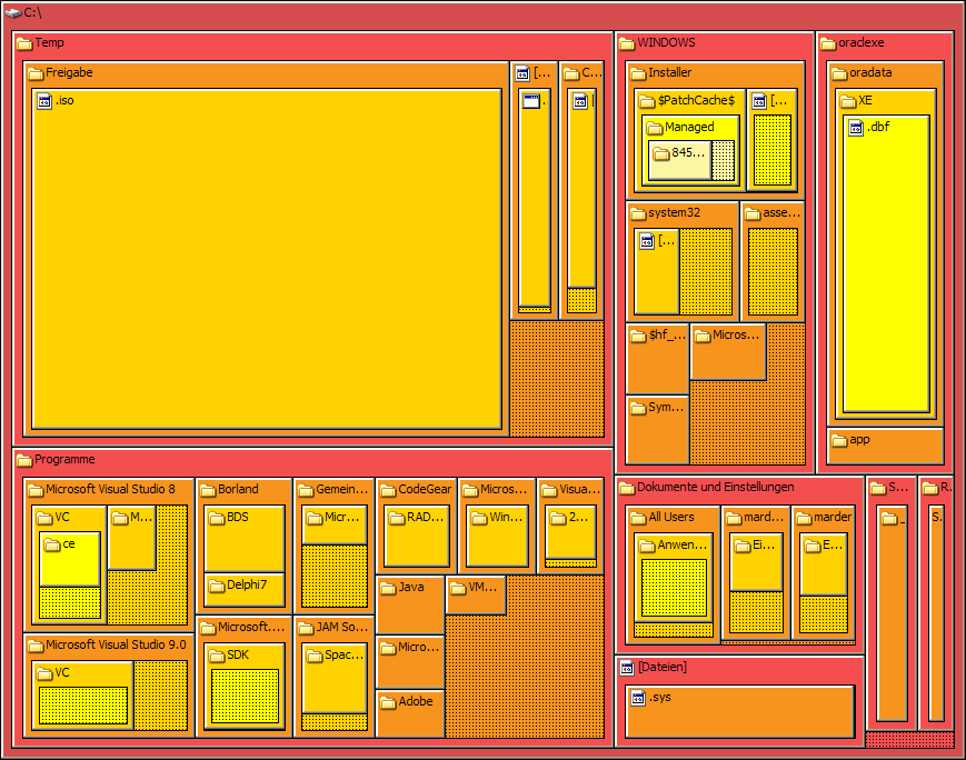 Treemapping